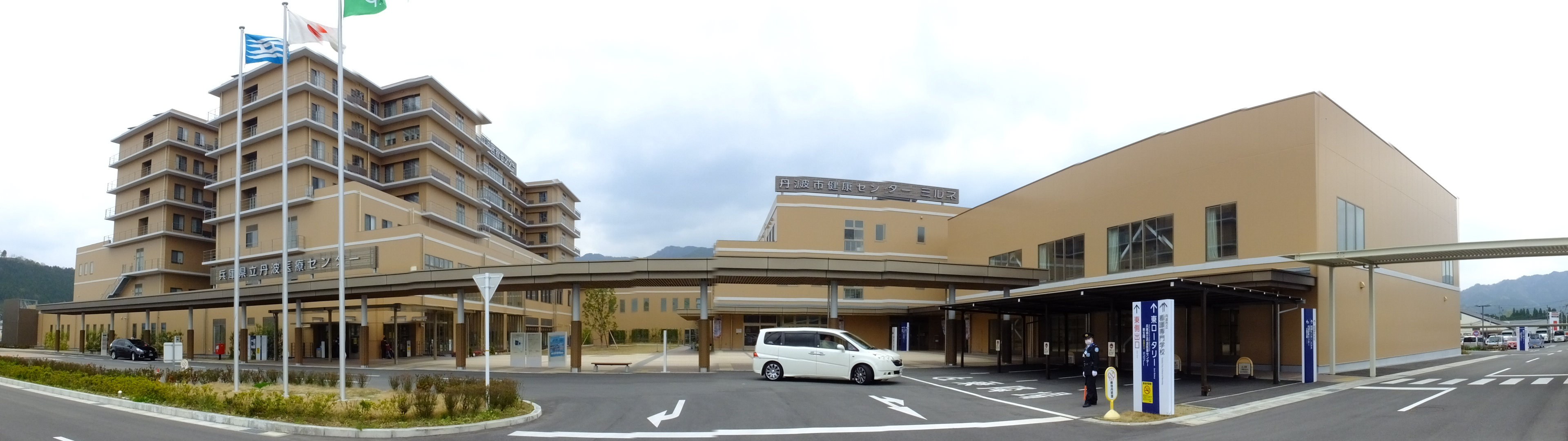 2020-04-16 Hyogo Prefectural Tamba Medical Center（兵庫県立丹波医療センター）